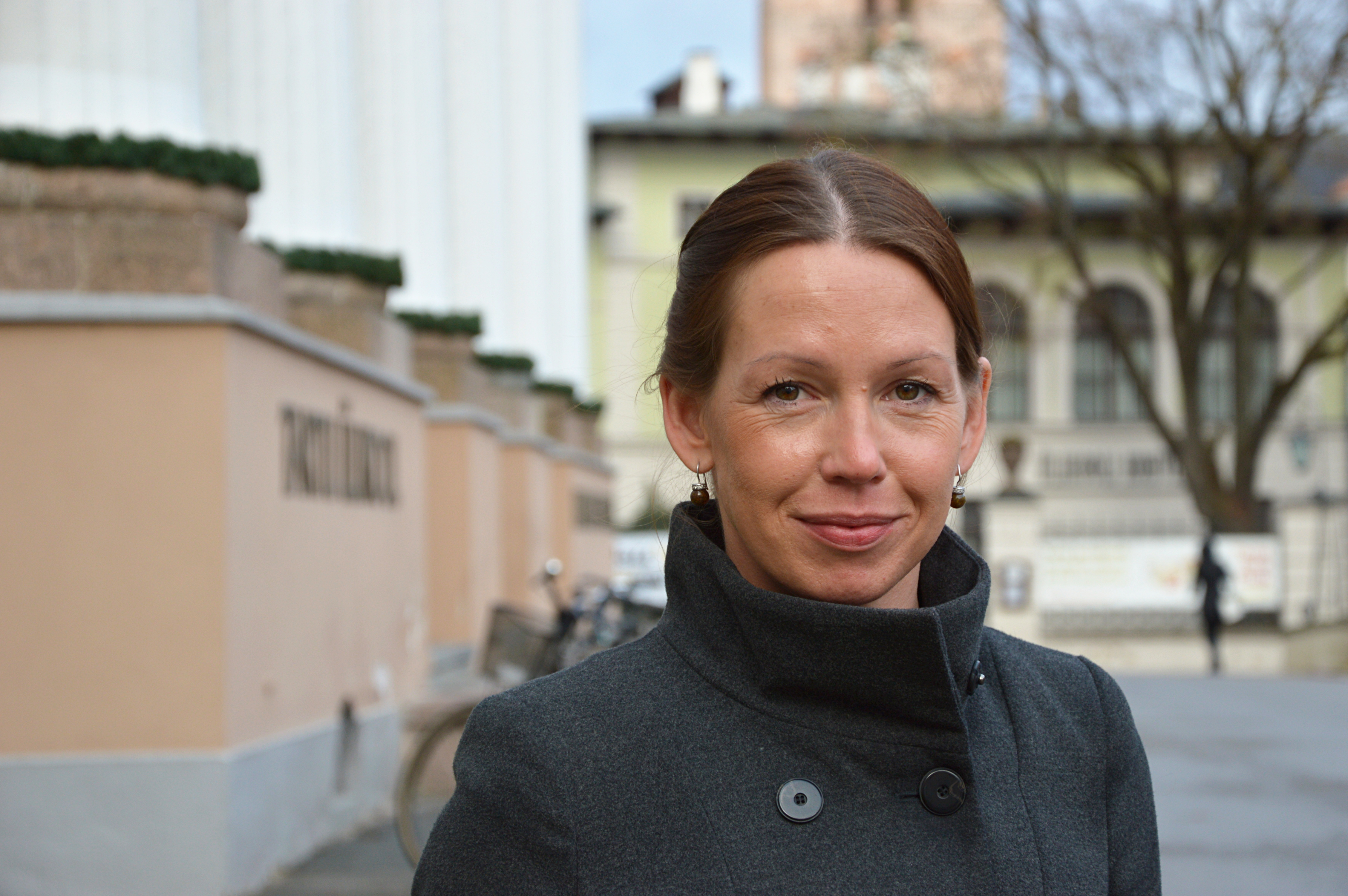 Sirli Zupping Tartu Ülikooli peahoone ees.